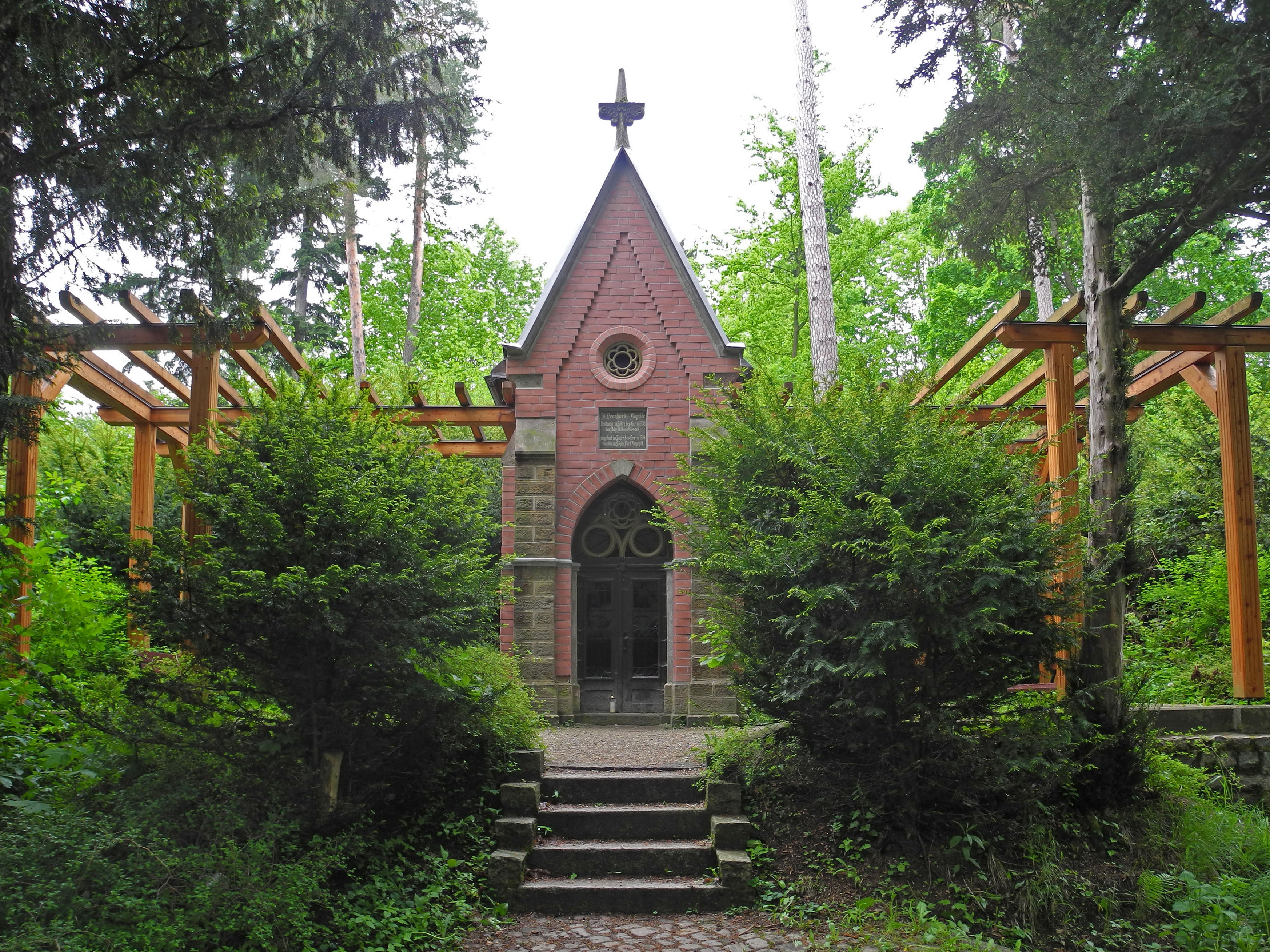 Sankt-Leonhard-Kapelle in Karlsbad (Karlovy Vary)